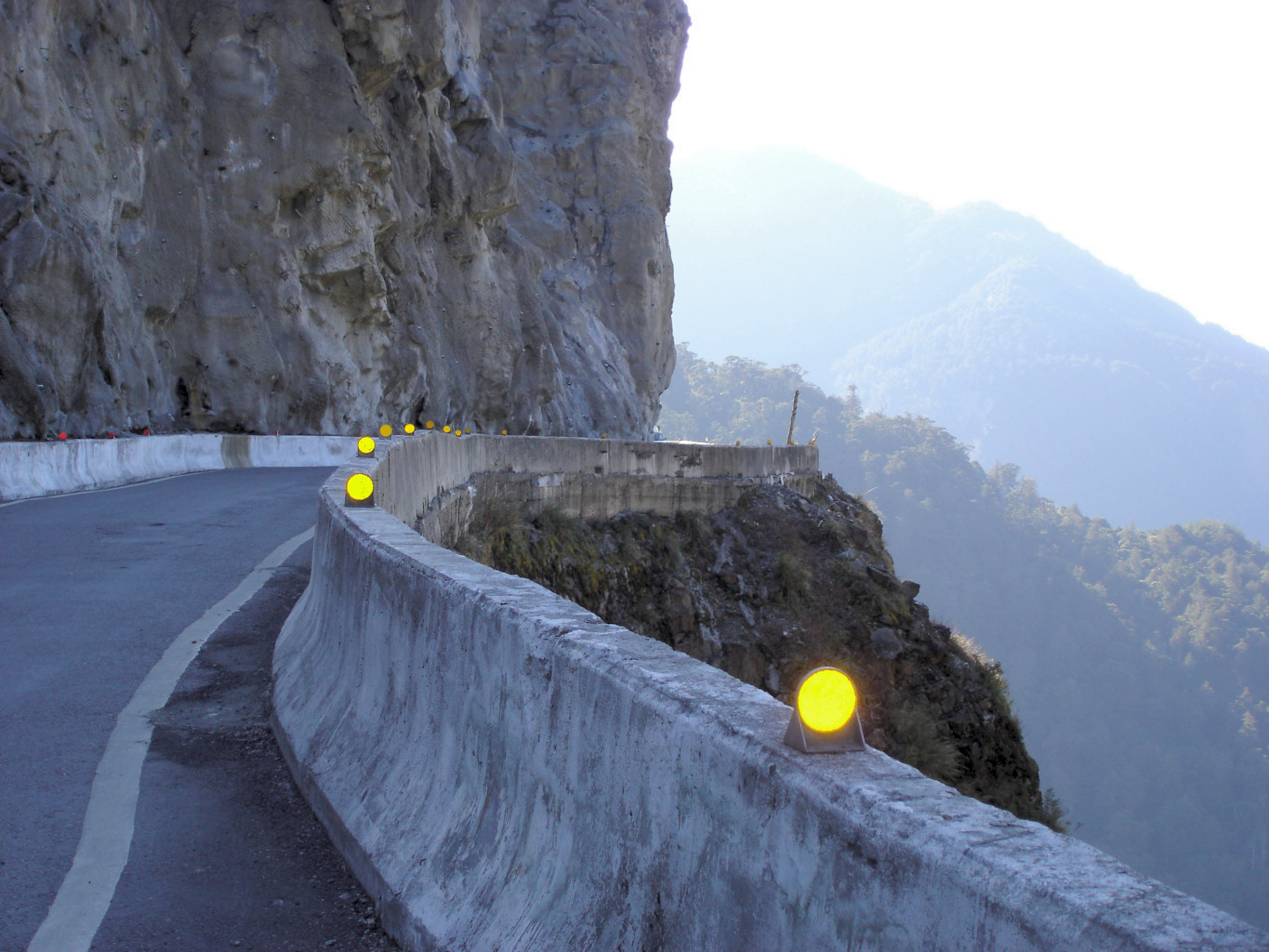 南橫一景